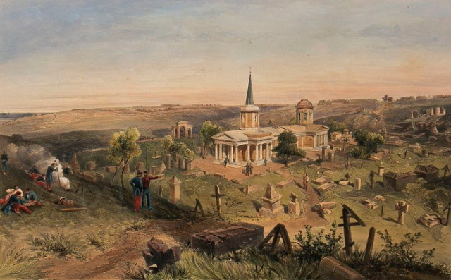 Симпсон (Simpson) Уильям (1823 - 1899) Карантинное кладбище и церковь, с французской батареей №50 Лист из серии Крымская война, 1850-е